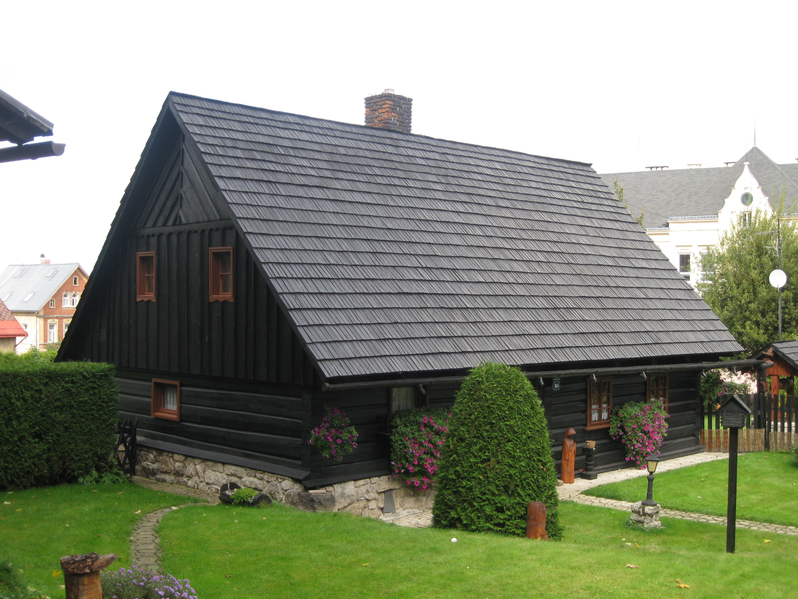 Venkovský dům (Jablonec nad Nisou), Křížová 164/32, Jablonec nad Nisou